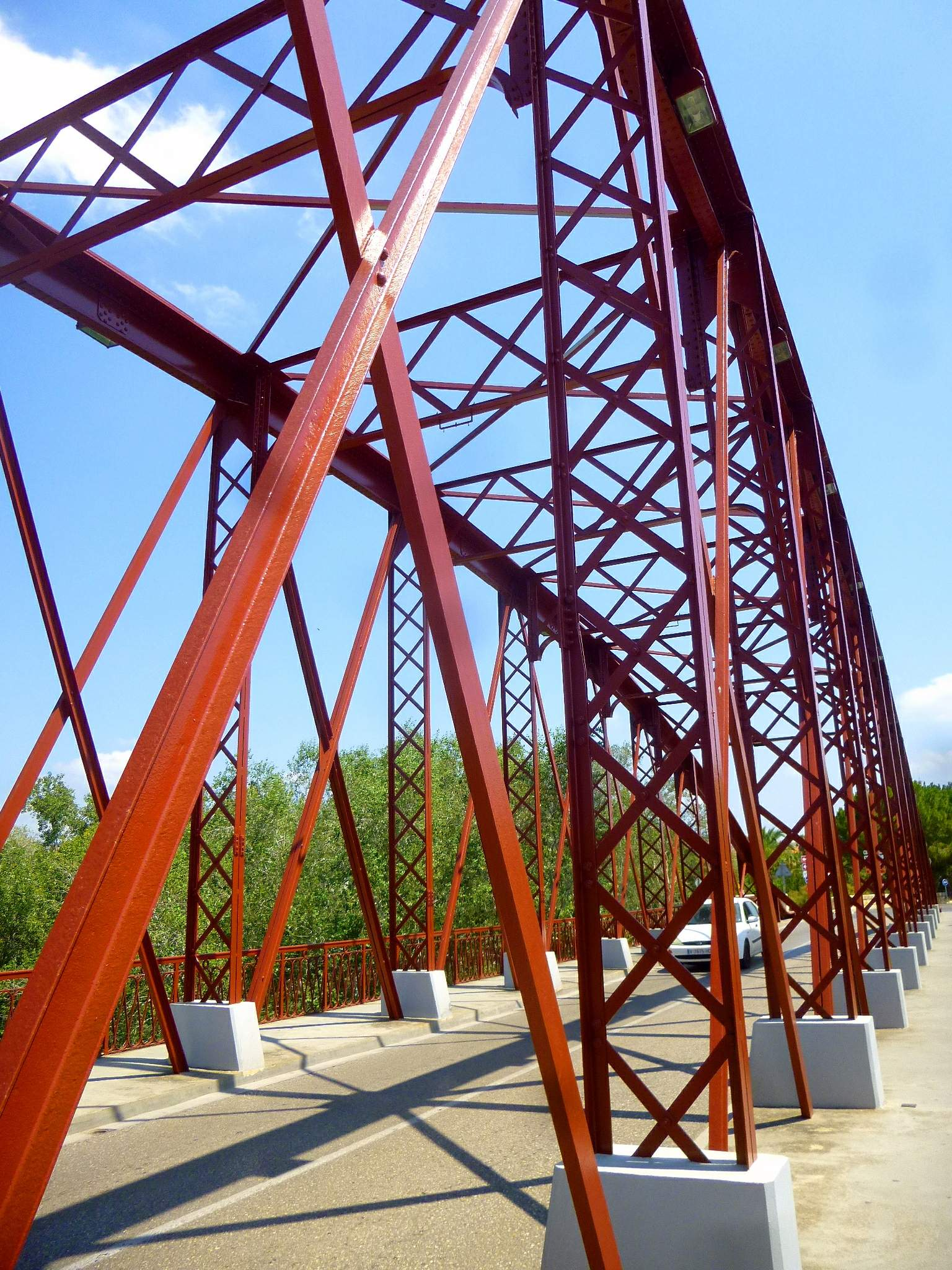 Puente de Hierro sobre el Júcar en Alcira (Valencia)